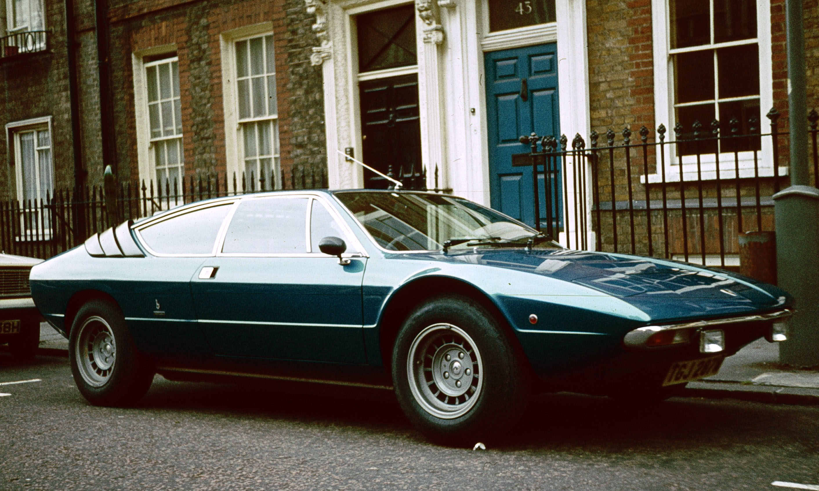 Lambo Uracco in London